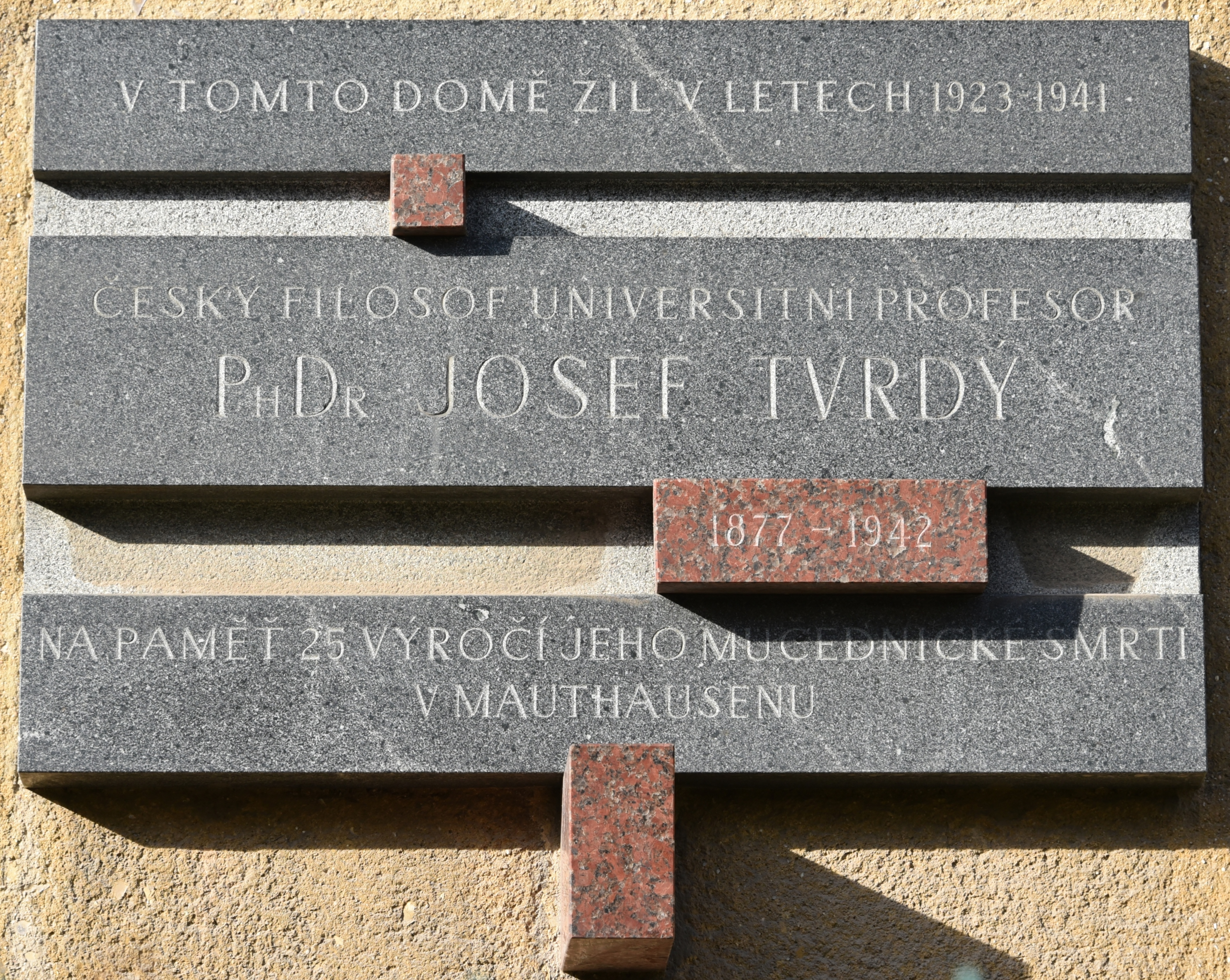 Gedenktafel für Josef Tvrdy